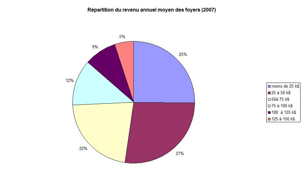 Répartition des revenus annuels dans les foyers de Dudley (Géorgie, États-Unis)